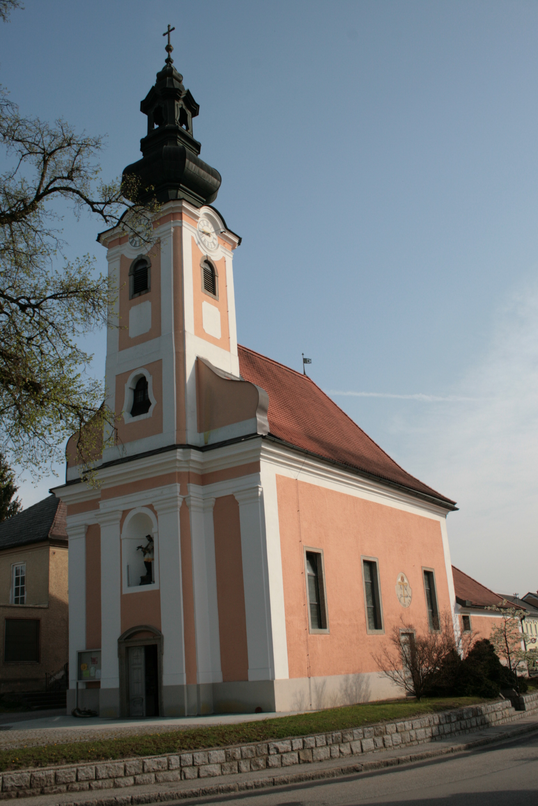 Kath.Pfarrkirche, Klam, Oberösterreich, Austria